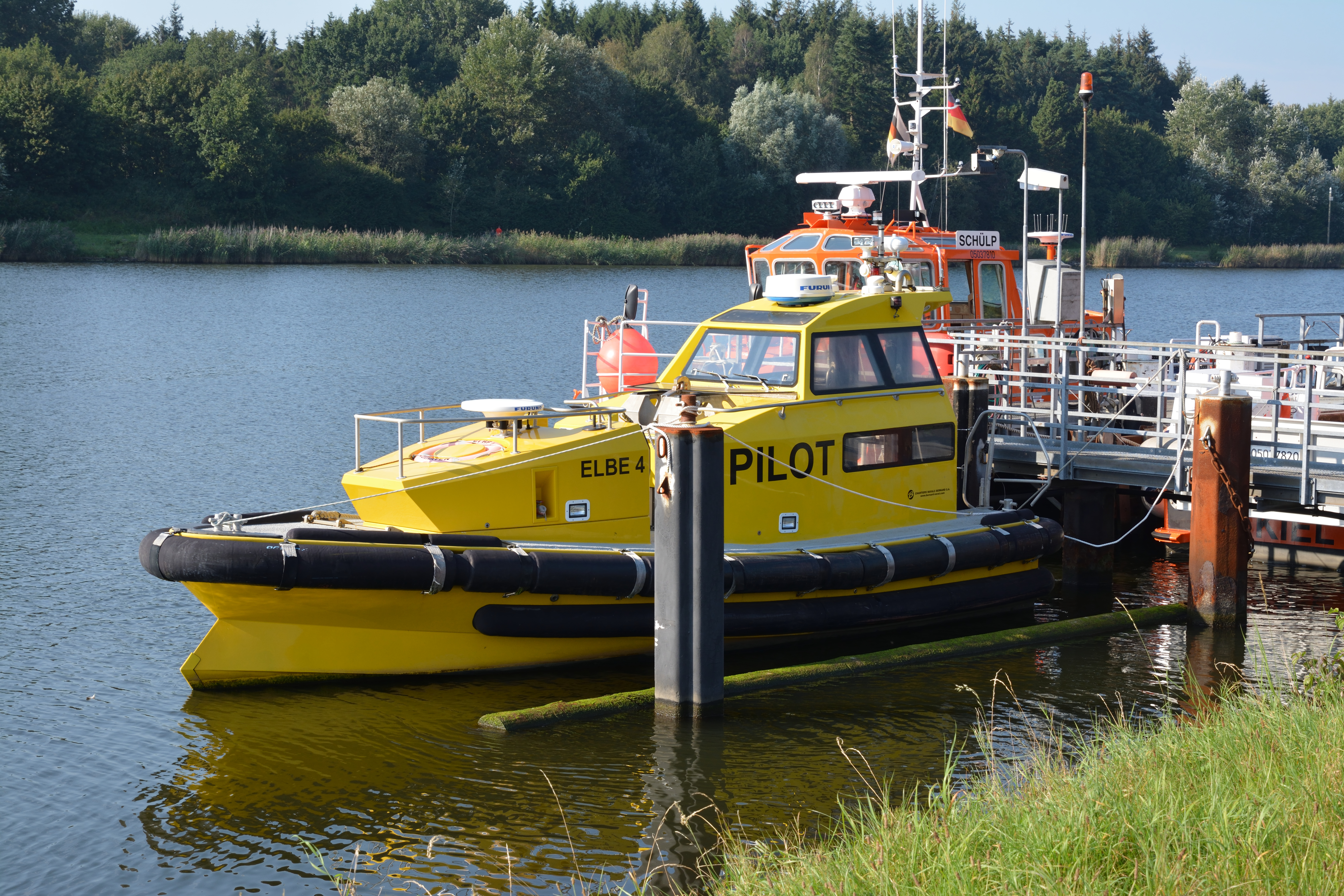 Impressionen der Lotsenstation Rüsterbergen am Nord-Ostsee-Kanal im September 2016.